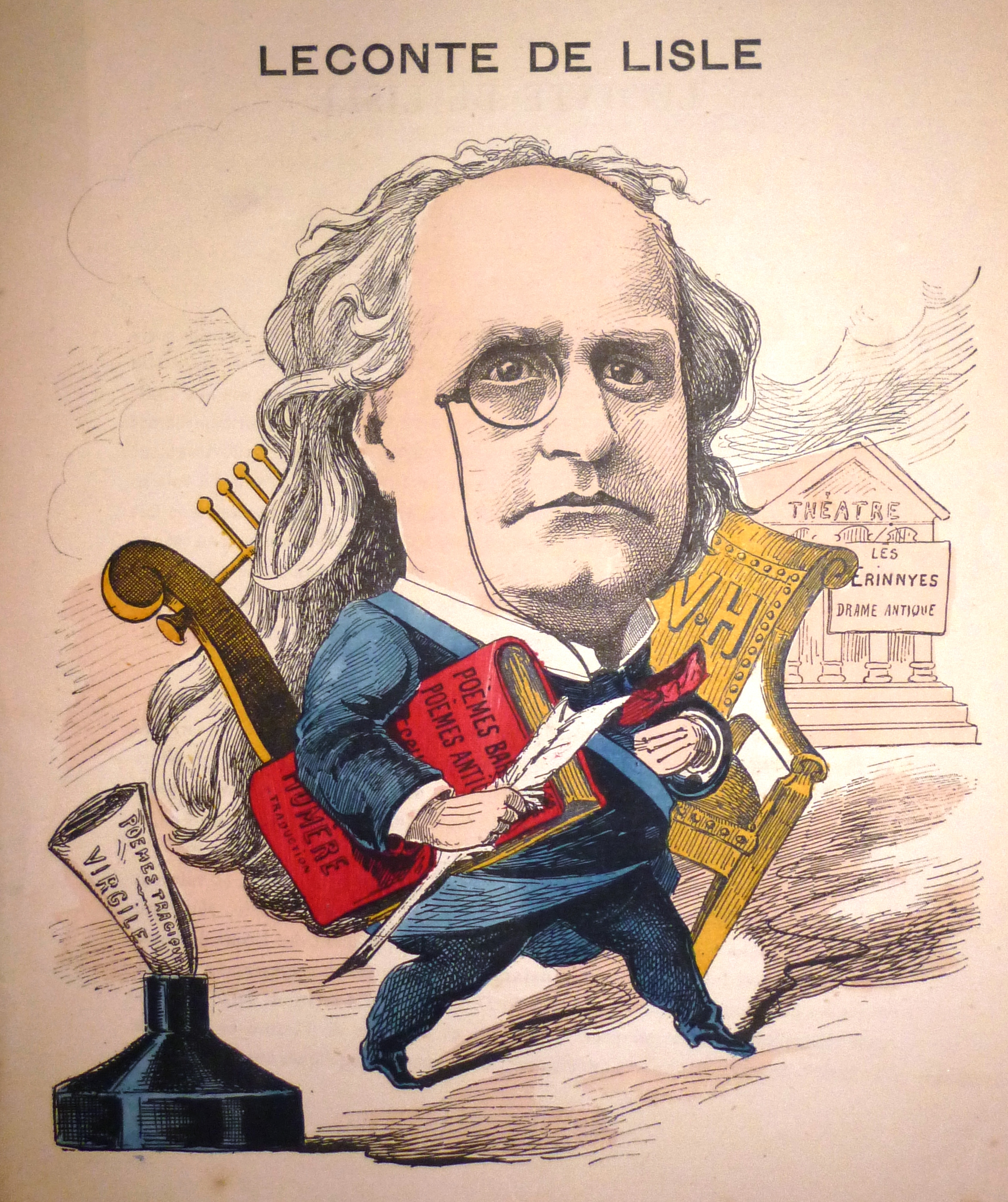 Caricature de Leconte de Lisle par Coll-Toc